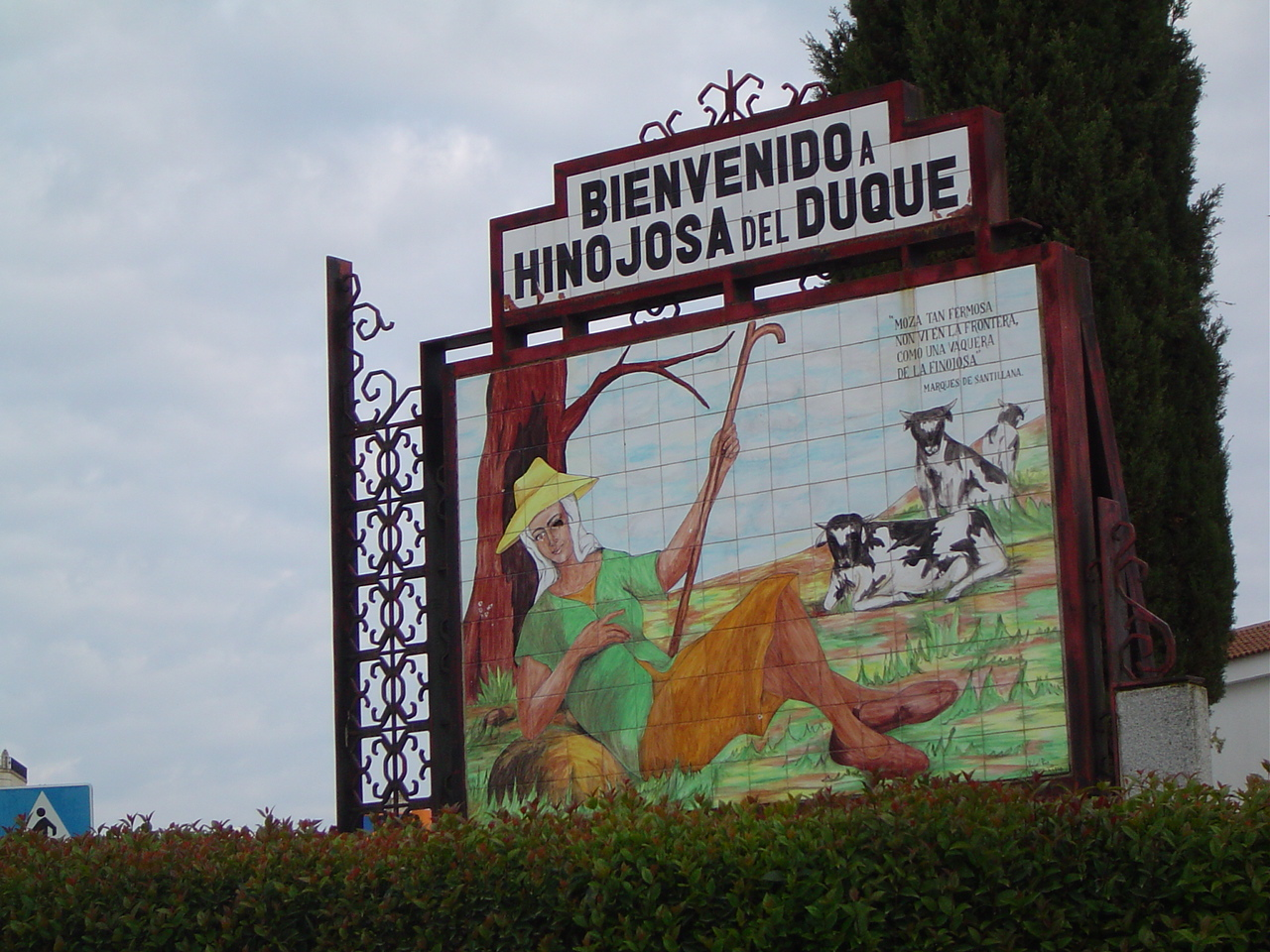 Mural/mosaico de bienvenida de la localidad de Hinojosa del Duque, en Córdoba, España (Mural/mosaic of welcome of the locality of Hinojosa del Duquee, in Cordoba, Spain)